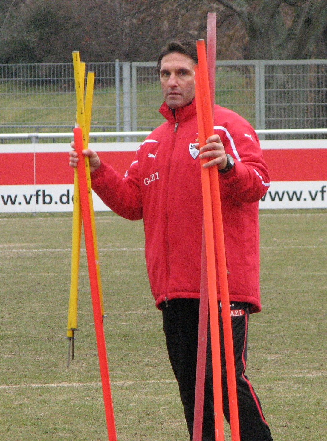 Bruno Labbadia, Trainer des VfB Stuttgart. Aufgenommen von